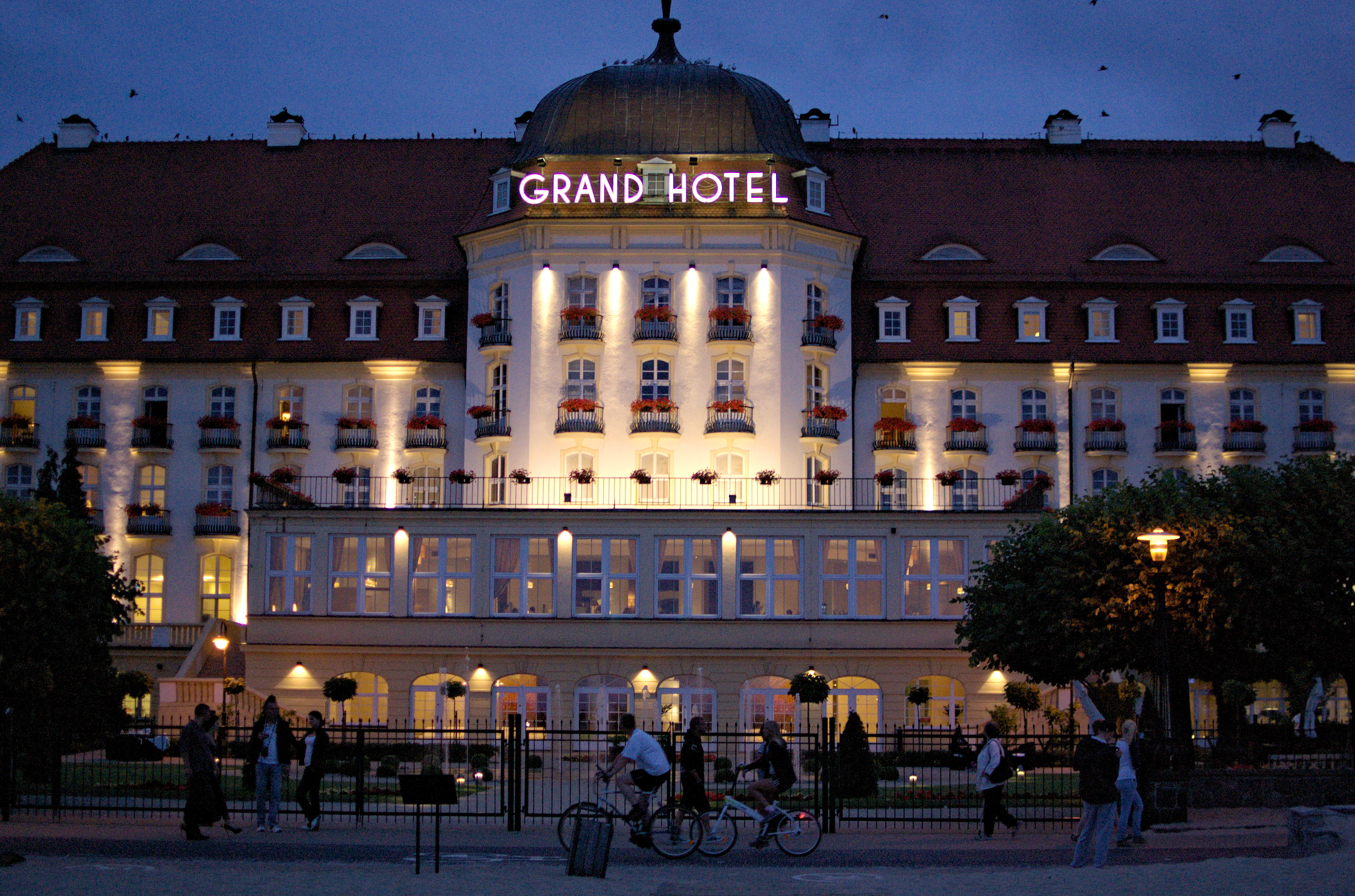 Sopot, hotel kasyna gry GRAND HOTEL, 1927